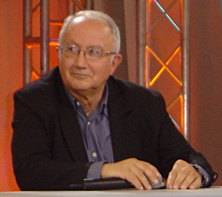 Jean Audouze, le 5 juin 2005